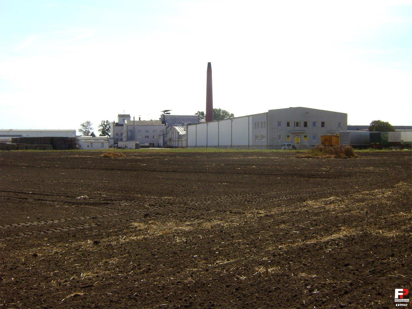 Cykoria SA. ( przed II wojną światową Fabryka Cukru ).